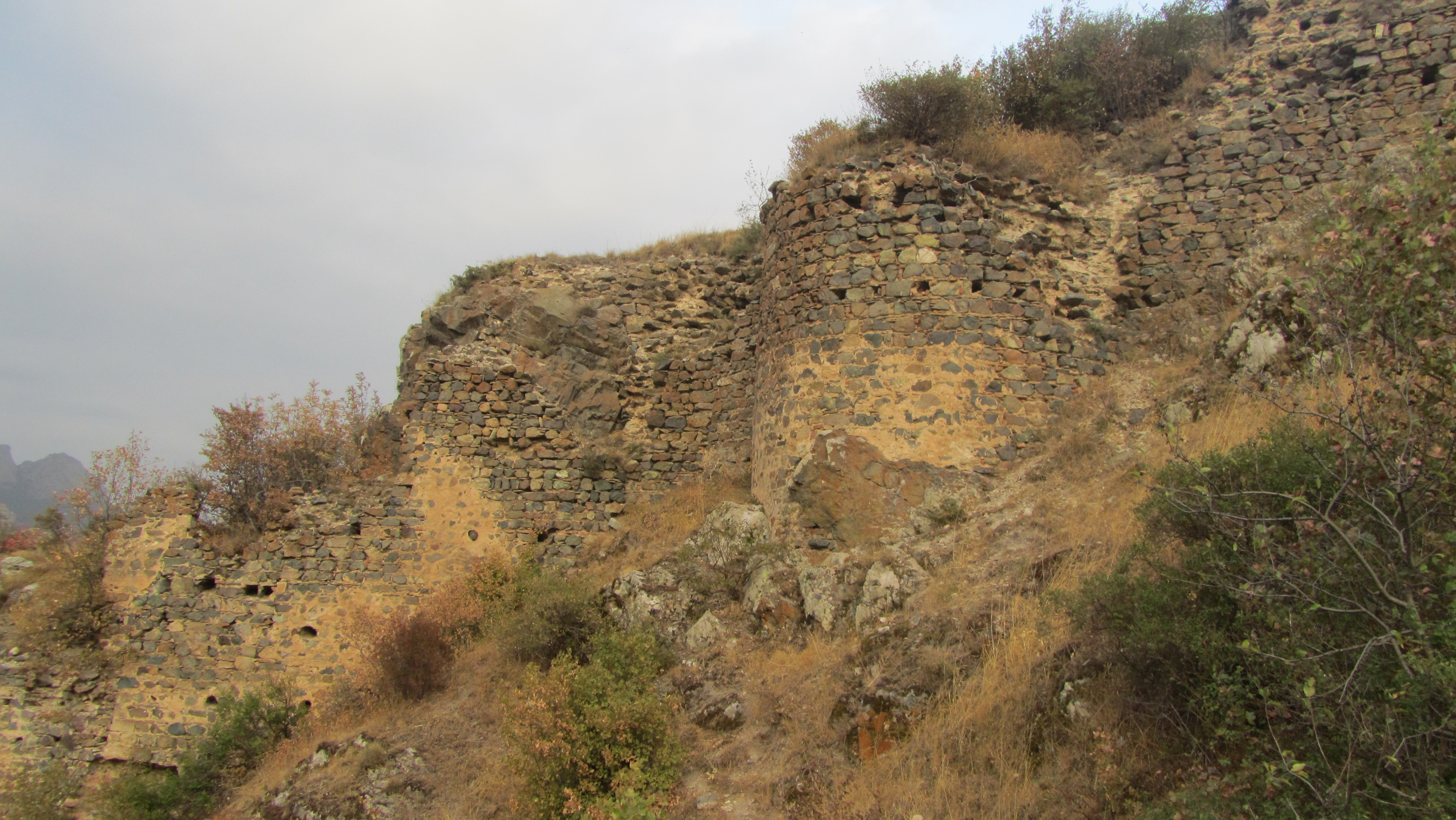 Ամրոց Բաղաբերդ (Դավիթ Բեկի բերդ) - Անդոկավան - քաղաքից ամ, Քաջա­րան տանող մայրուղուց ձախ, Ողջի գետի և նրա ձախ վտակ Գիրաթաղ գետակի միջև, բար­ձունքի վրա - Սյունիքի նշանավոր ամրոցներից էր, կիսավեր 13.1/1